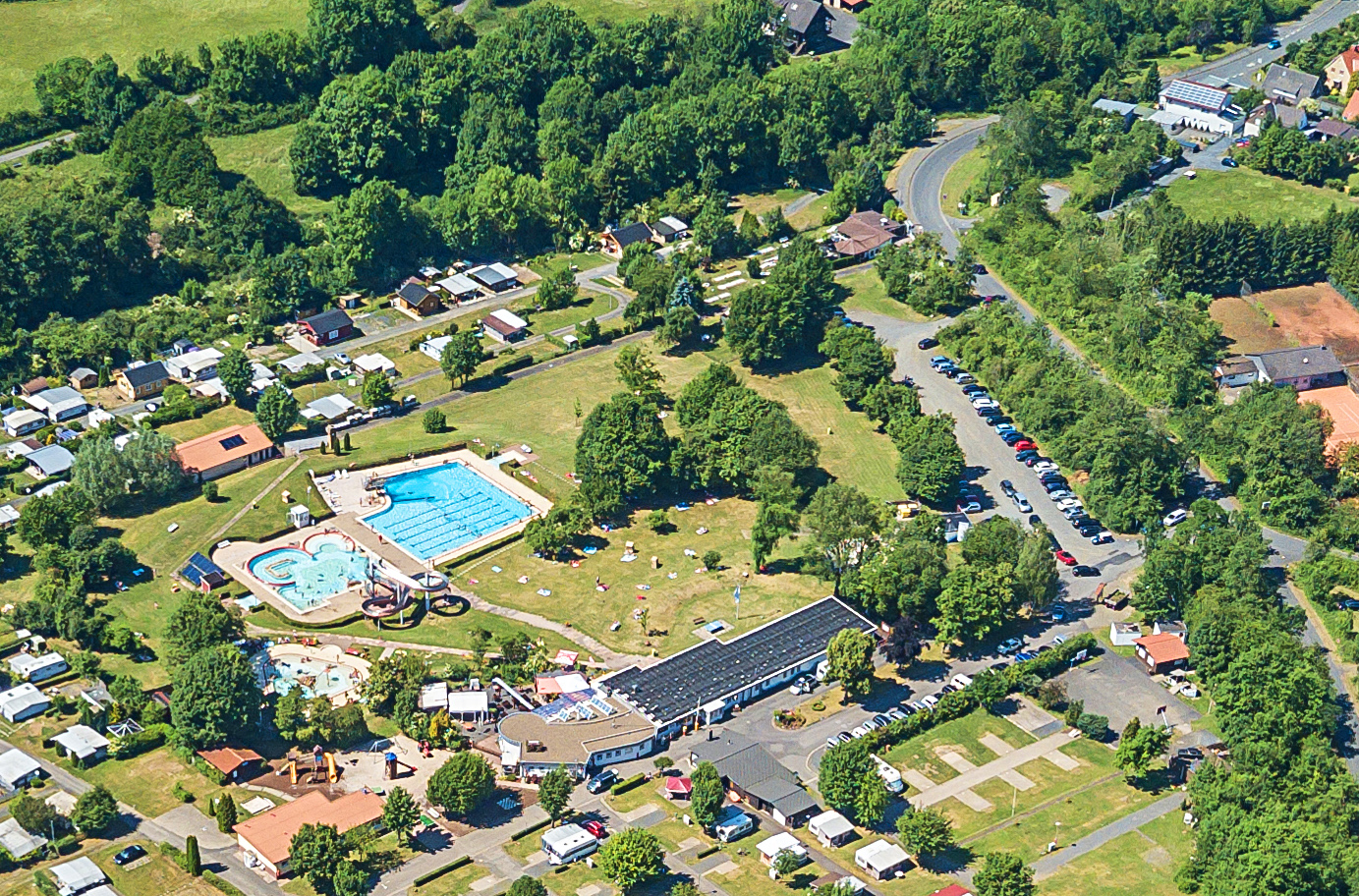 Erlebnisbad in Dransfeld. Luftbild von Süden.